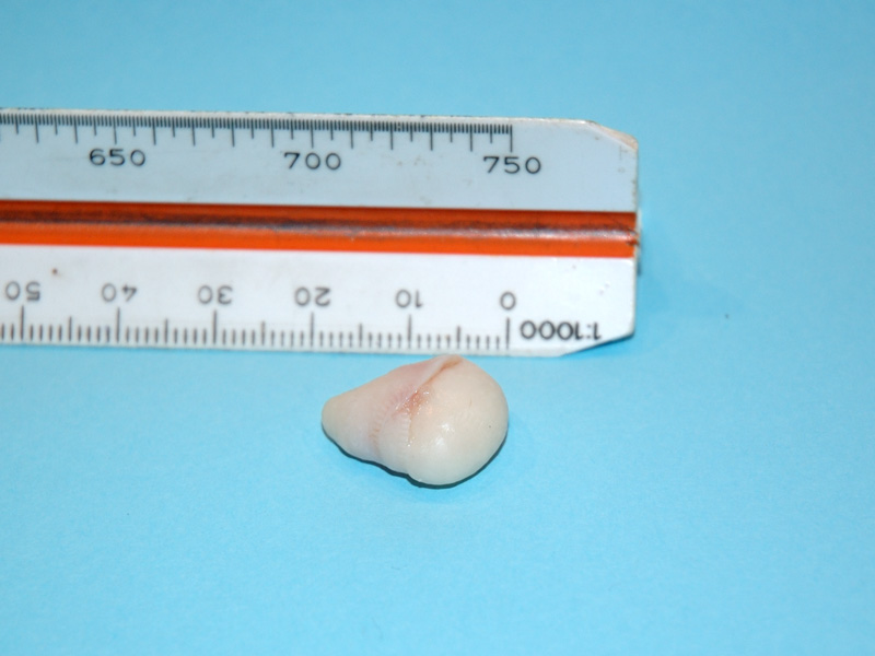 Grützbeutel